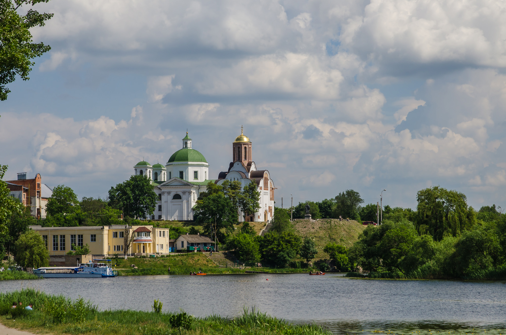 Костел Іоанна Предтечі (мур.), Біла Церква, Соборний майдан, 4